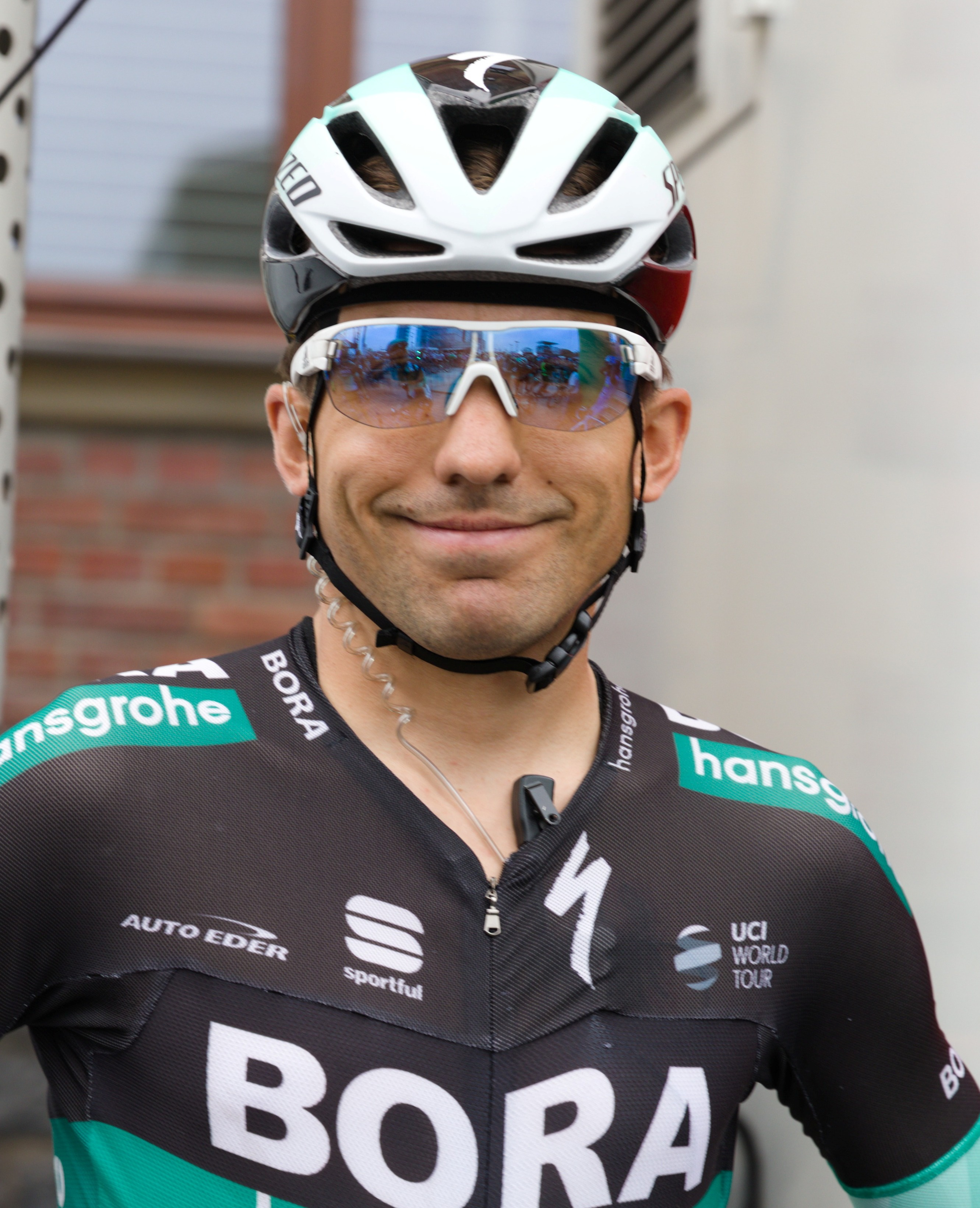 Cesare Benedetti, italienischer Radsportler